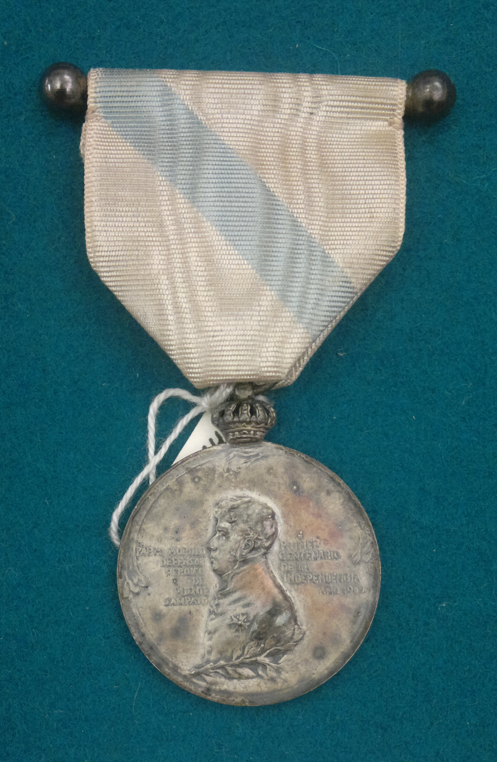 Medalla conmemorativa dos combates de Ponte Sampaio, outorgada no primeiro centenario da batalla. Foi outorgada ós descendentes dos combatentes e ás persoas que colaboraron nos actos de conmemoración. Na medalla aparece o retrato de Pablo Morillo. (1).